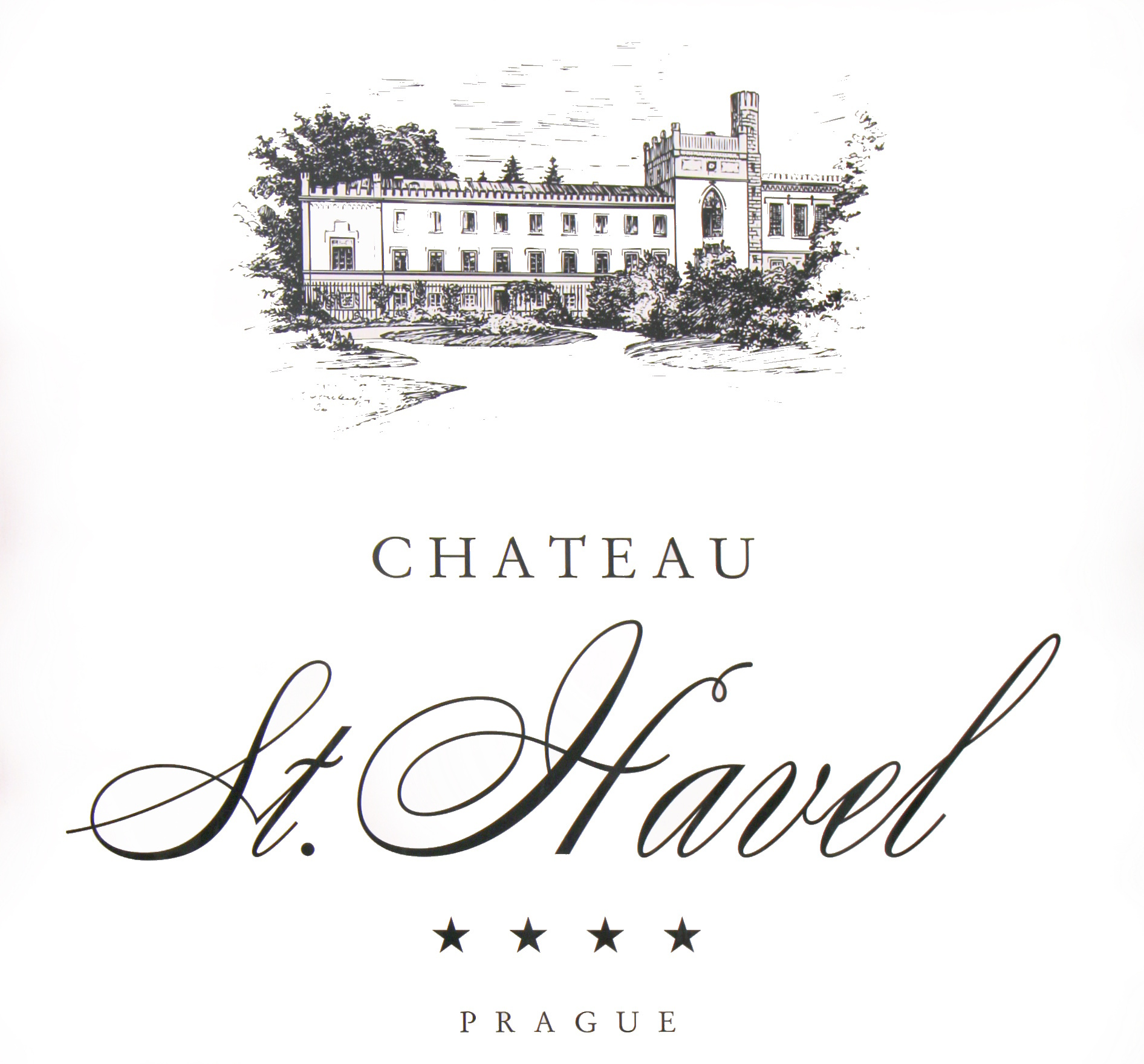 Krčský zámek sv. Havel